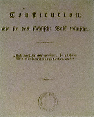 Titelblatt des Dokuments "Constitution, wie das sächsischen Volk wünscht"; Sächsisches Staatsarchiv, Dresden, Deutschland